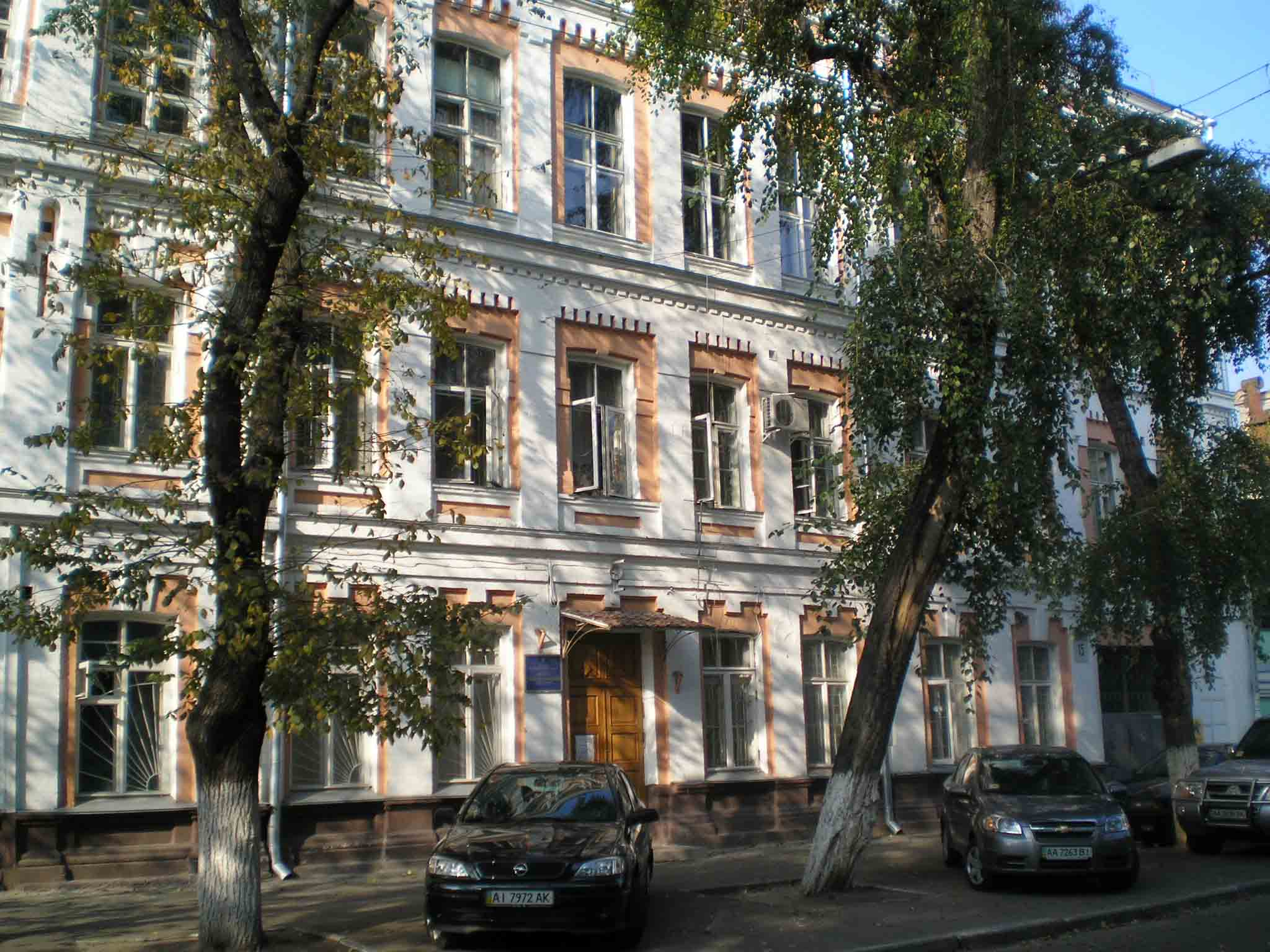 Здание Института социальной и политической психологии НАПН Украины (г. Киев, ул. Андреевская, 15)